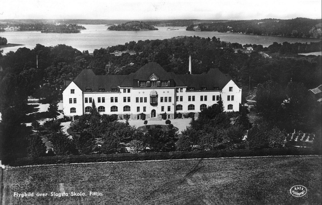 Slagsta skola, färdigställd 1911. Arkitekt Georg Ringholm. Rivet 1973